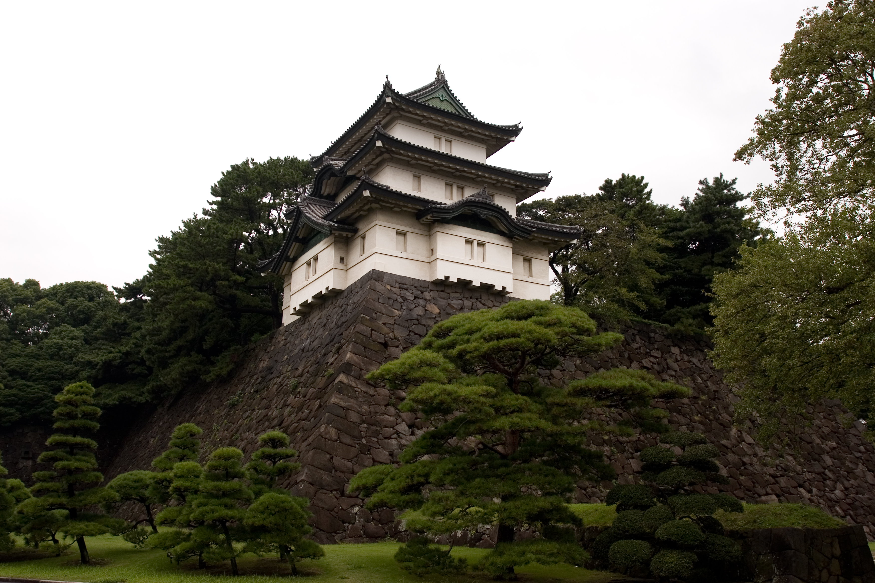 Fujimi-yagura, Imperial Palace, Tokyo, Japan